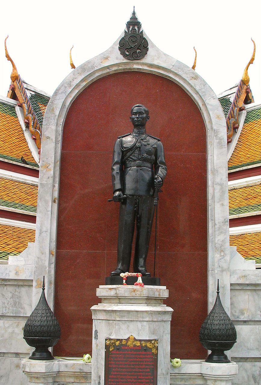 Statue of King Ananda Mahidol (Rama VIII.) in Wat Suthat, Bangkok, Thailand.